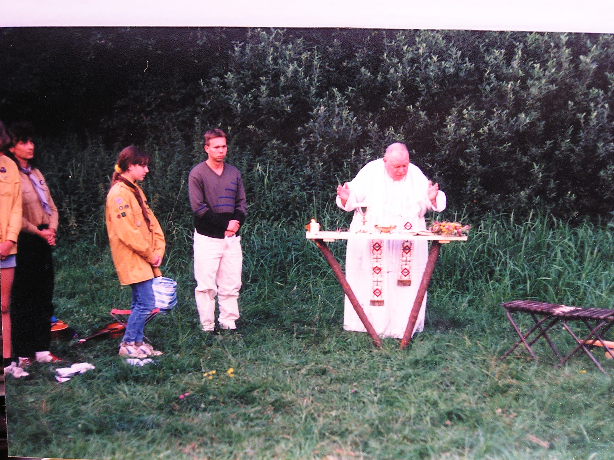 František Hobizal slouží polní mši